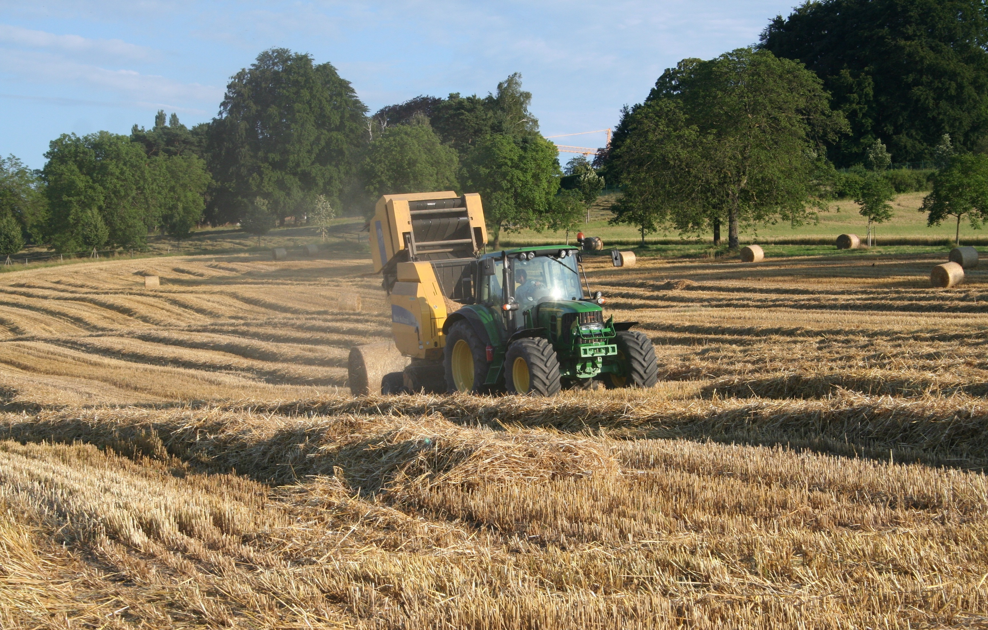 Les moissons de la campagne de Tournay de Pregny-Chambésy, dans la campagne genevoise.